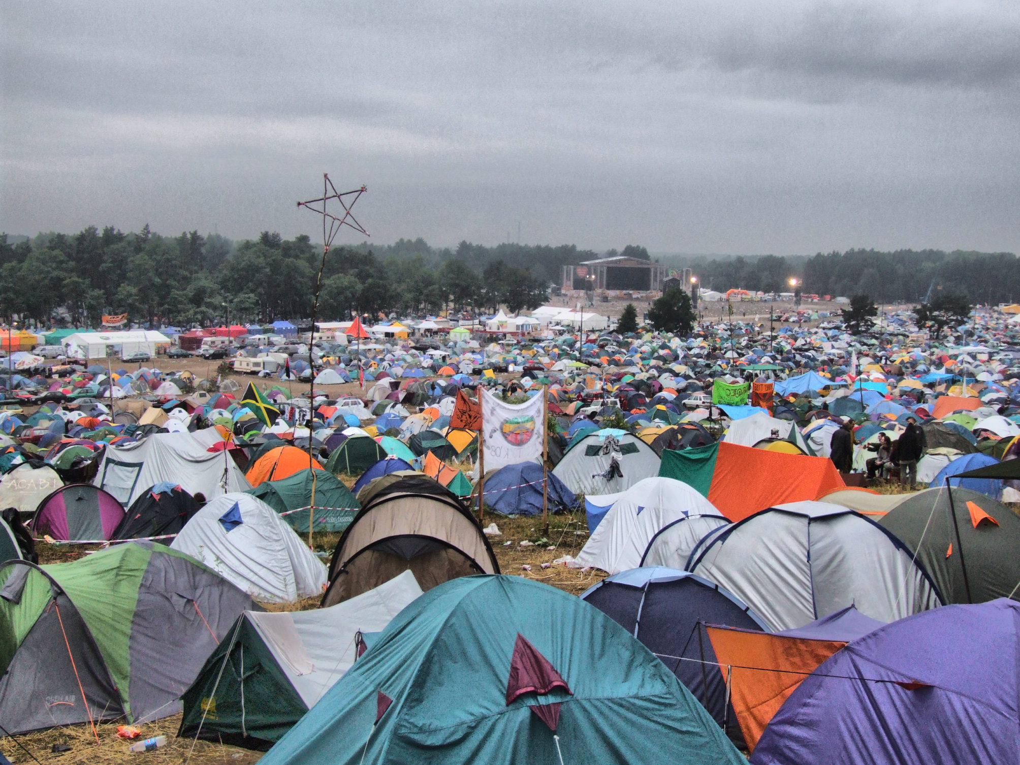 Scena festiwalu Przystanek Woodstock. Na pierwszym planie - pole namiotowe